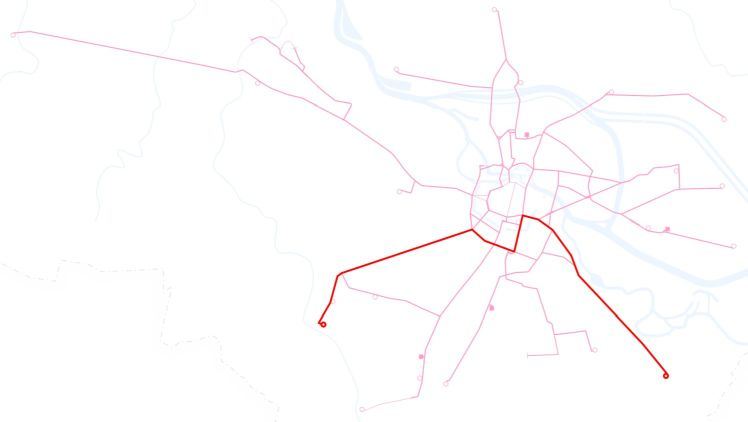 Poglądowa mapka przebiegu linii tramwajowej 5 we Wrocławiu.